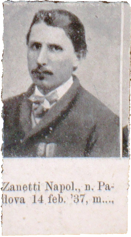 Ritratto di Napoleone Zanetti (1837 -1893)